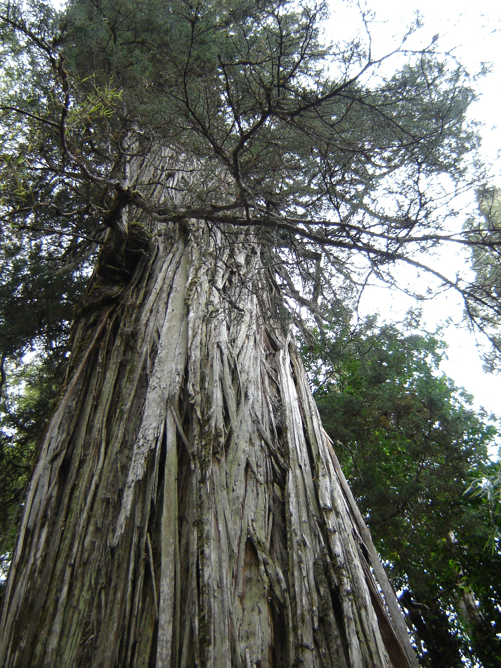 "Alerce milenario". Parque Nacional Los Alerces, U9201XAC, Chubut, Argentina Edad: 2620 años aproximadamente Altura: 57,5 metros Diámetro: 2,3 metros Especie: alerce o lahuán (Fitzroya cupressoides)